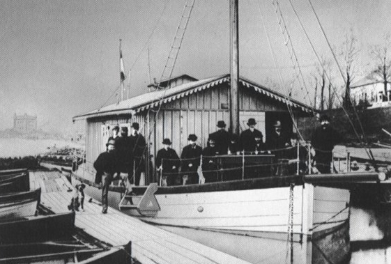 Das erste Bootshaus des Segelvereins Weser in Bremen